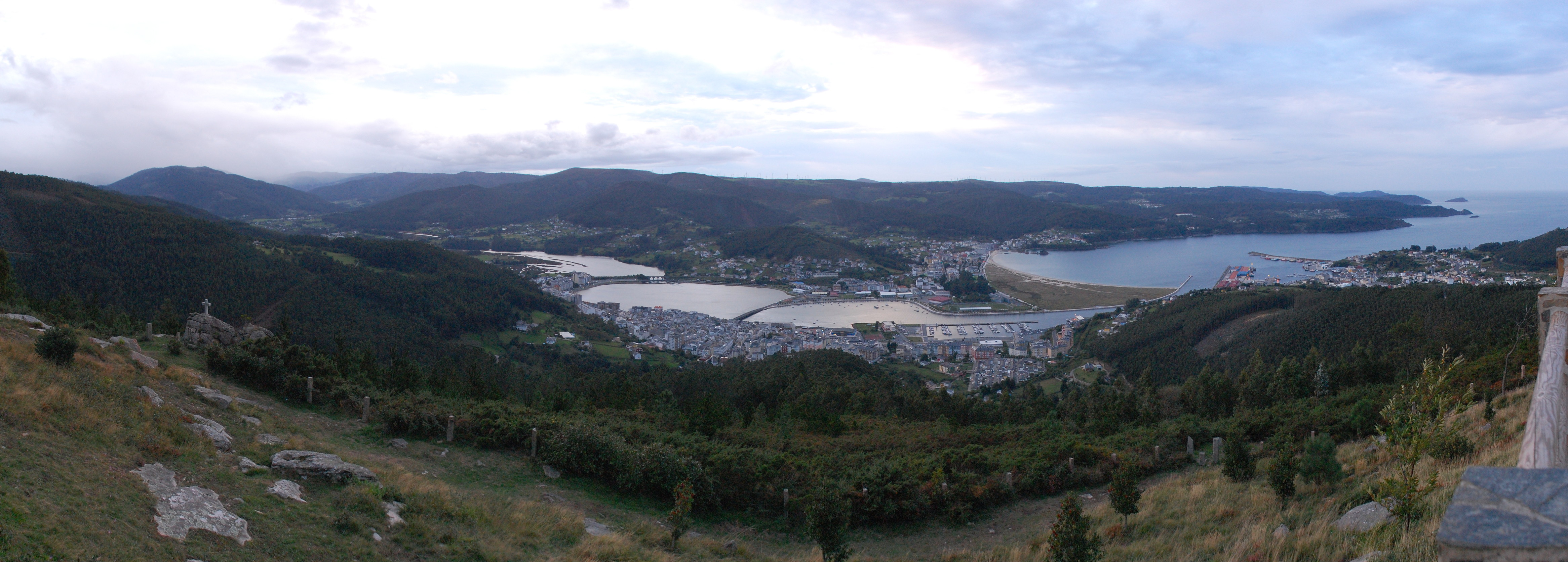 Desembocadura do río Landro na ría de Viveiro dende a Ermida de San Roque, entre a cidade de Viveiro e as vilas de Celeiro e Covas. Tamén son visibles a praia de Covas e a illa Coelleira. As paraxes pertencen ós Lugares de Importancia Comunitaria Costa da Mariña Occidental e Río Landro. This is a photography of a Special Area of Conservation in Spain with the ID: ES1120012. Natura2000 entry, EEA entry This is a photography of a Special Area of Conservation in Spain with the ID: ES1120017. Natura2000 entry, EEA entry